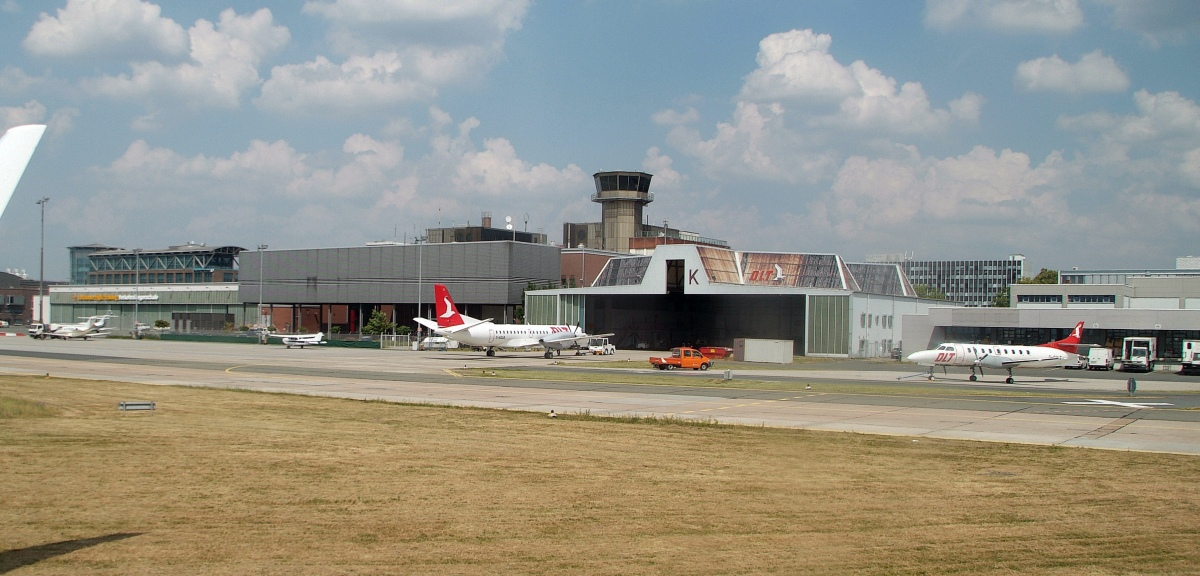 Bilder von Flughafen Bremen